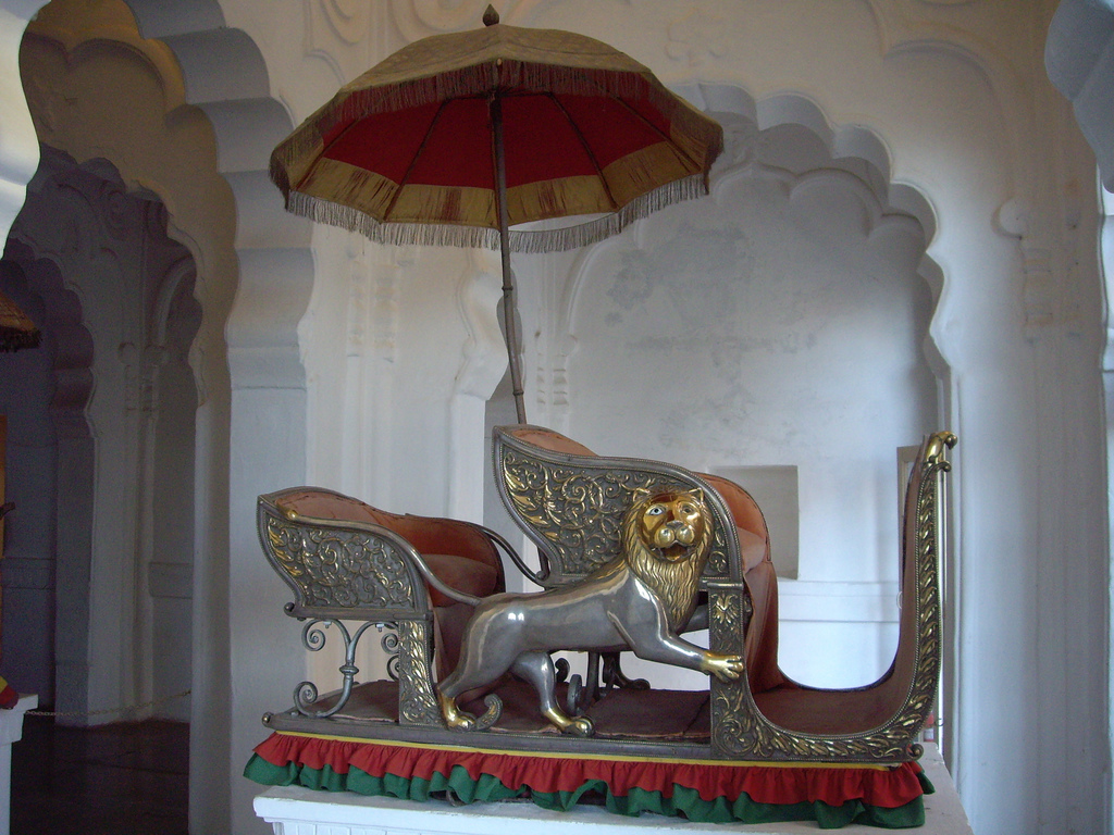 India (2007)